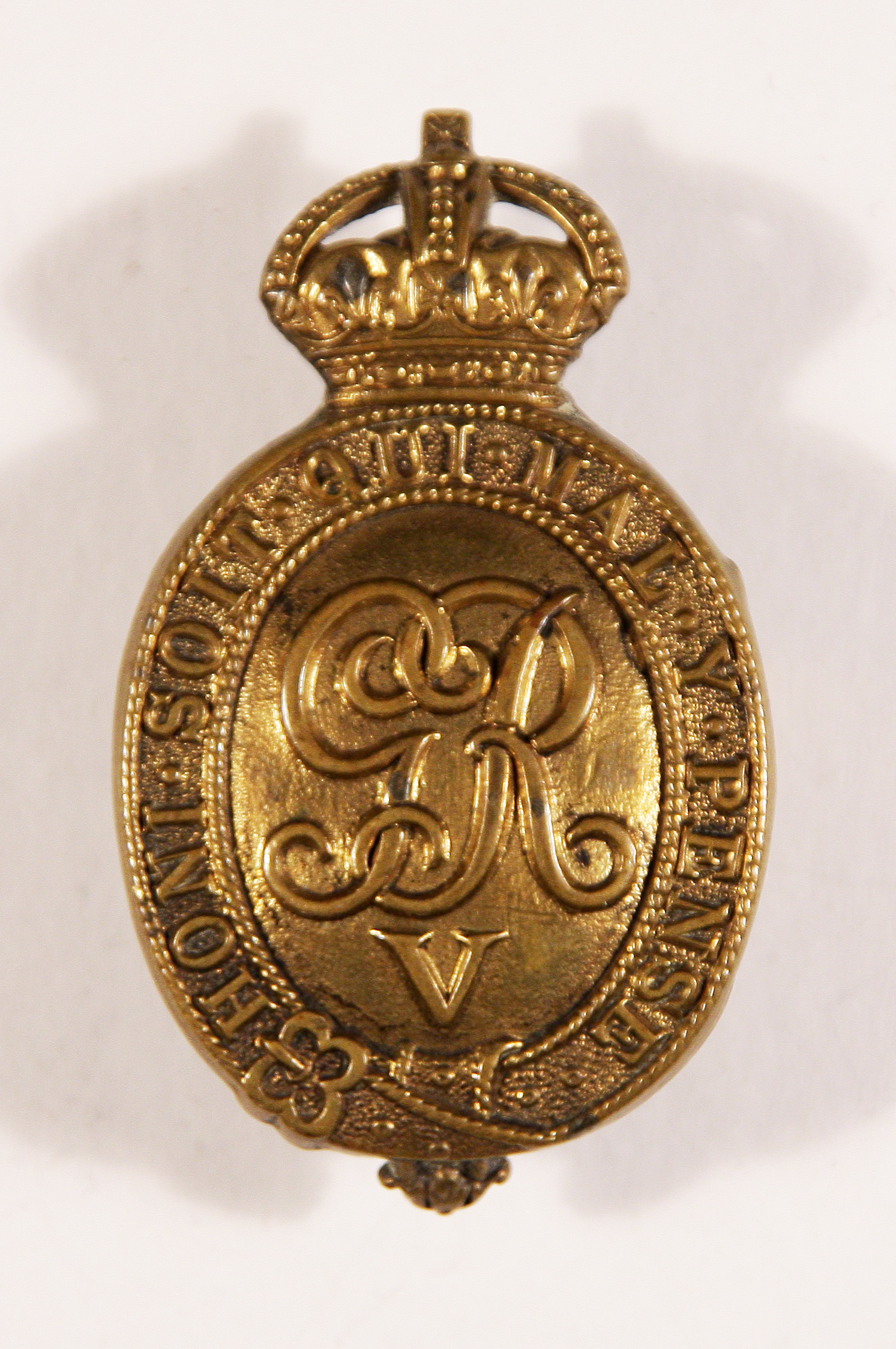 Gravur: "Honi Soit Qui Mal Y Pense" ("Beschämt sei, wer schlecht darüber denkt"). GR V = Georgus Rex V